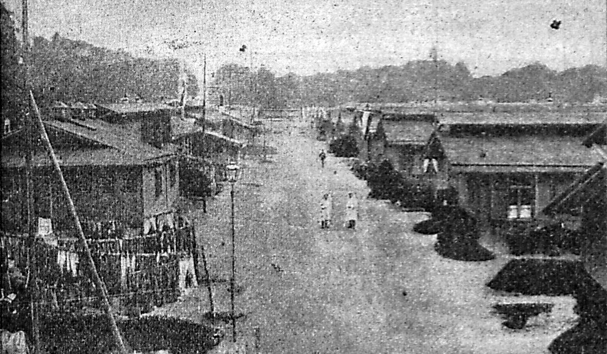 Gesamtübersicht über das Gelände des Baracken-Lazaretts